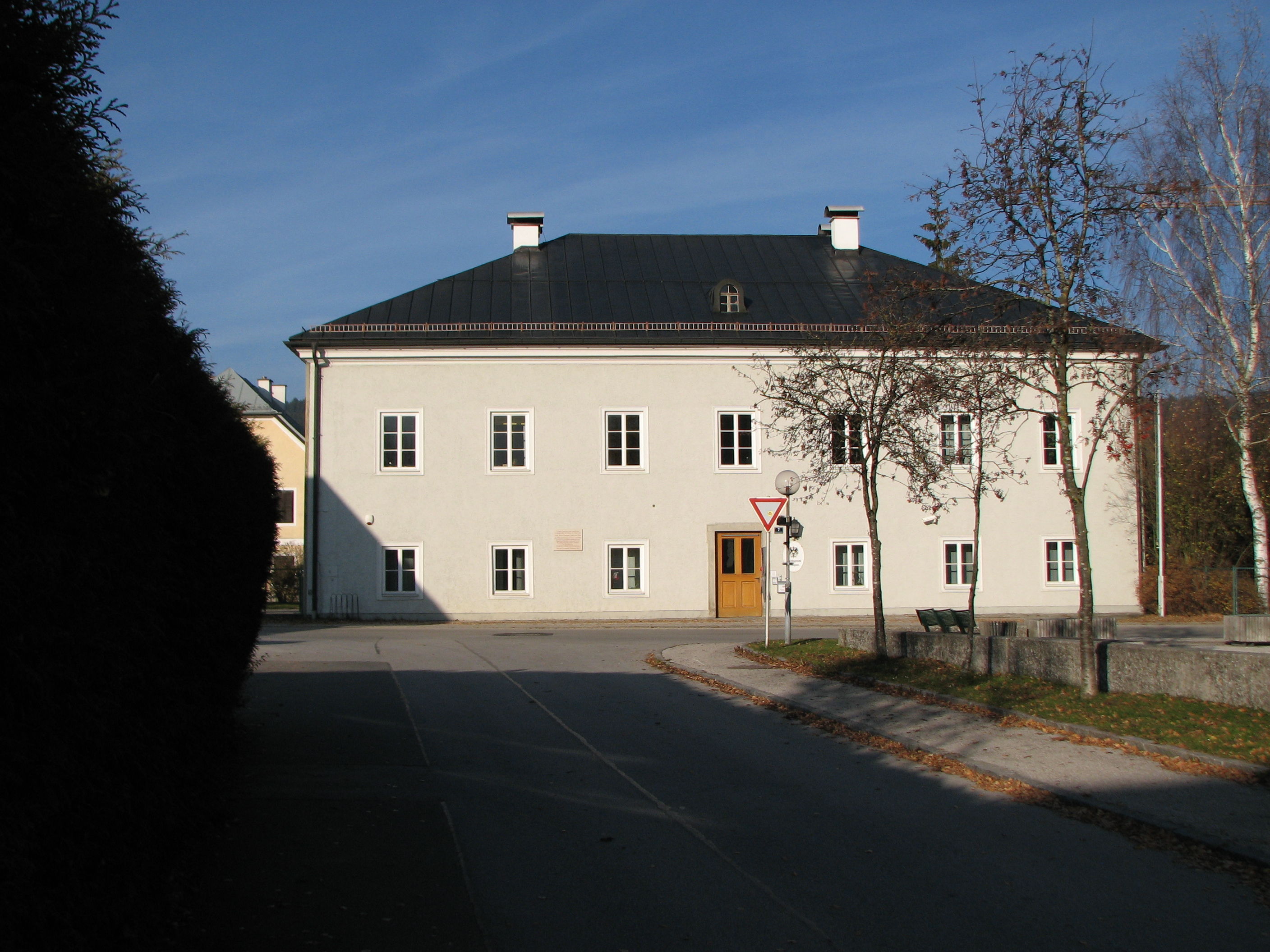 Bezirksgericht (ehem. Pfleggericht), Thalgau